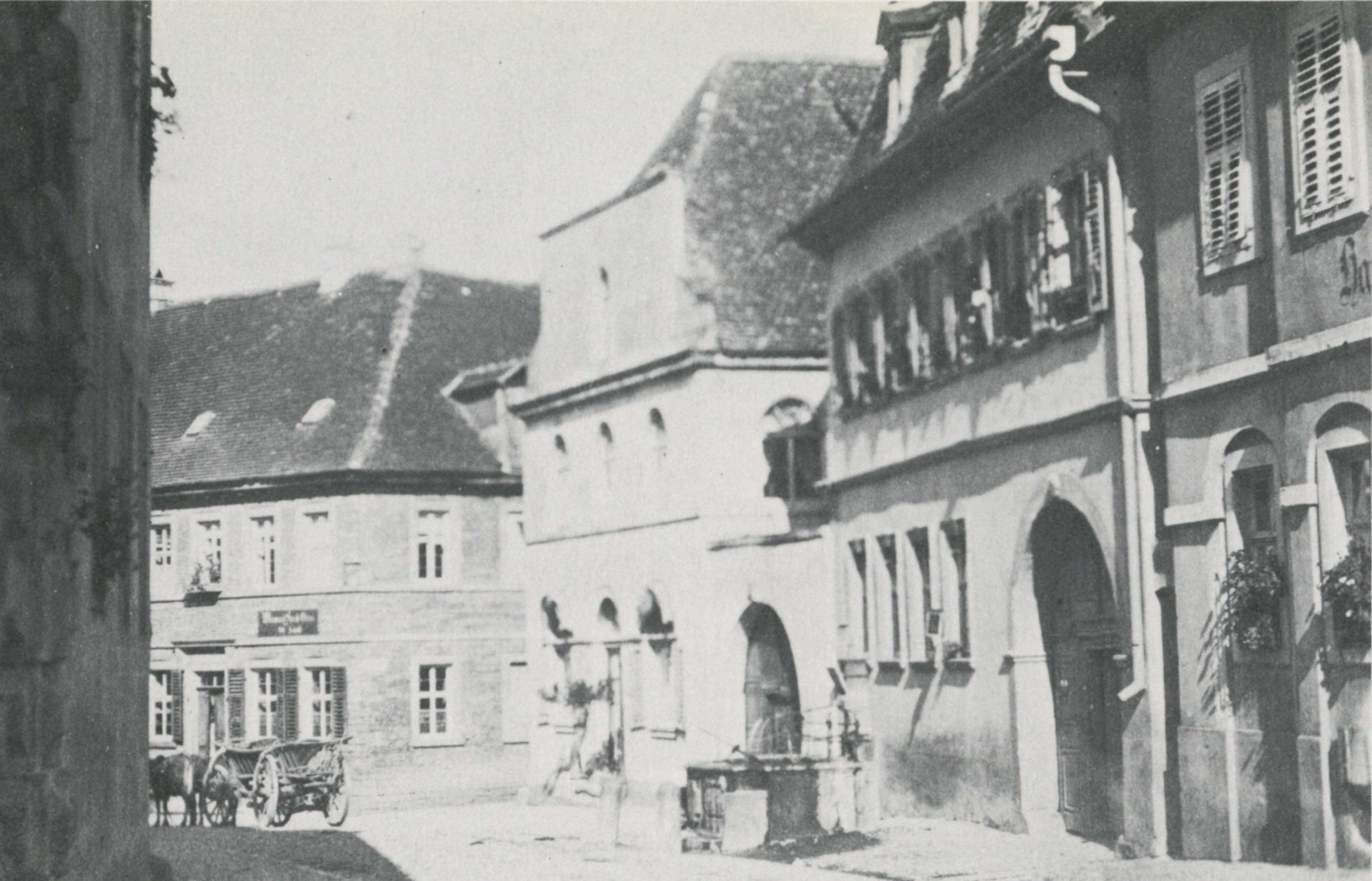 Fotografie der Unteren Hauptstraße in Volkach vor 1896. Im Mittelpunkt Hauptstraße 46 (mit Brunnen) und Hauptstraße 48.